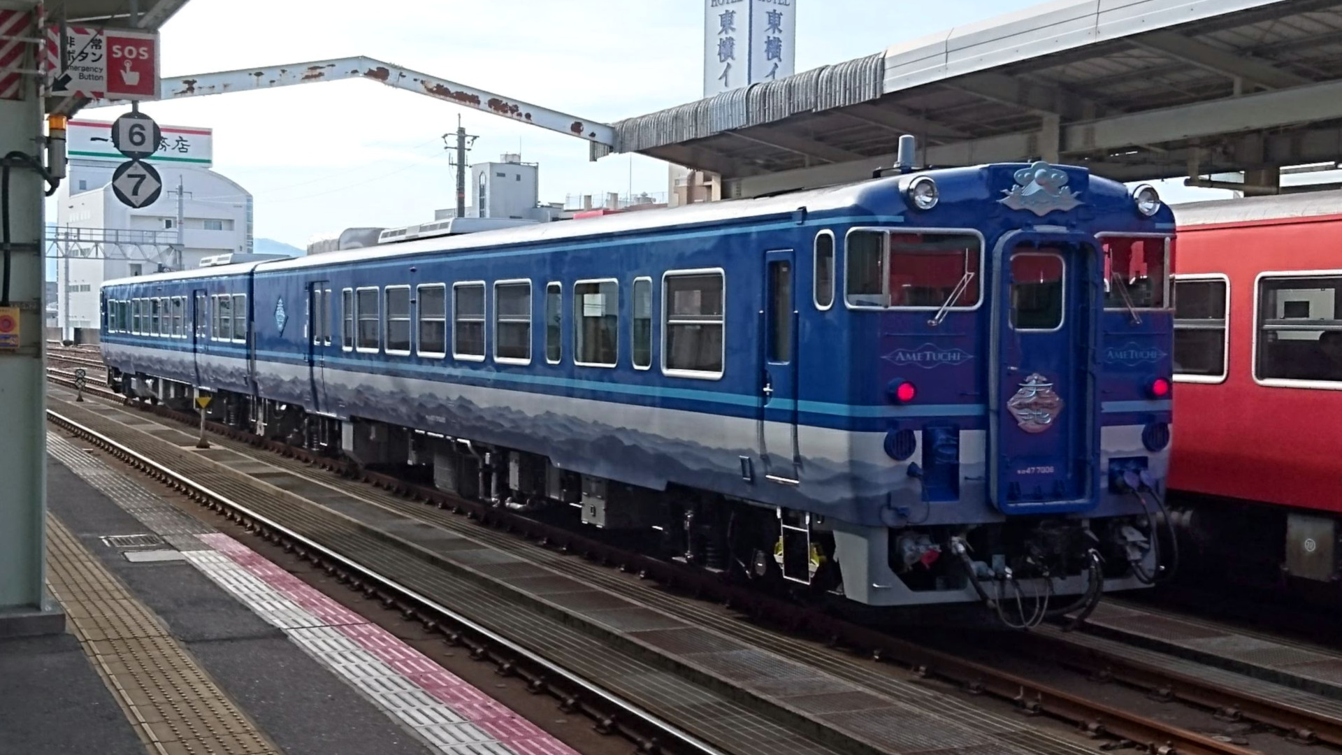 あめつち 鳥取駅にて撮影